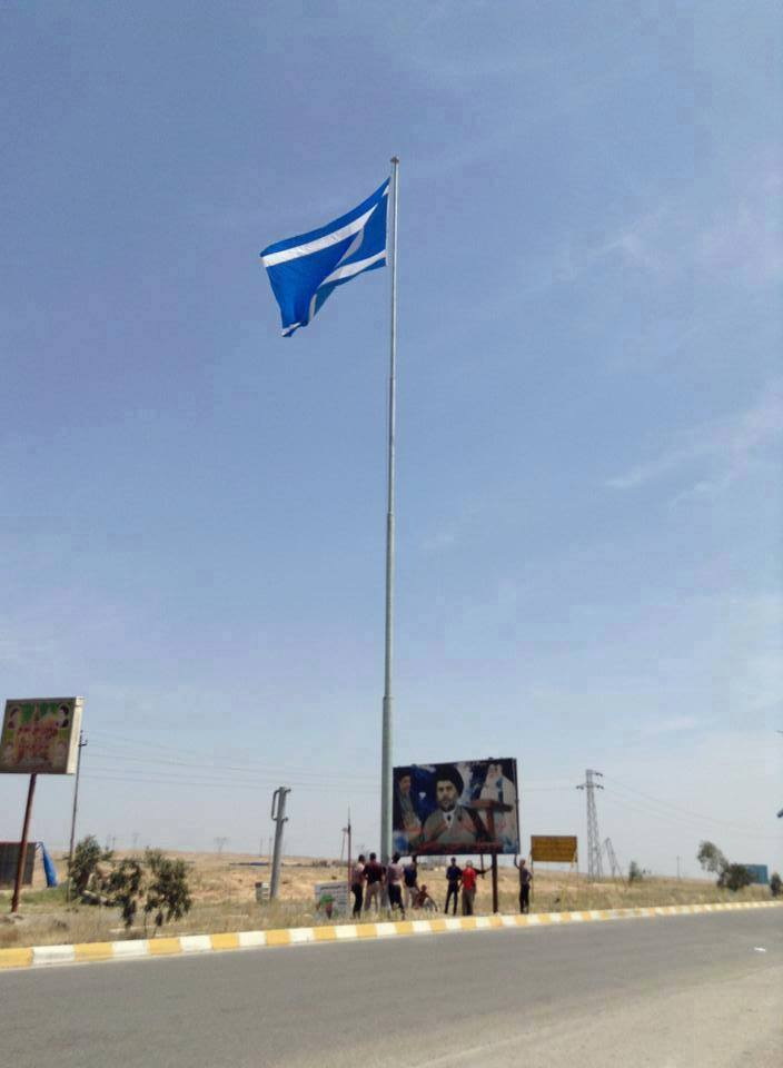 تۆرکجه: دوزخورماتو شهرین گیریشینده علی هاشم مختار اوغلونون شهید اولان یپرینده تورکمان بایراغی قالخیزیلدی